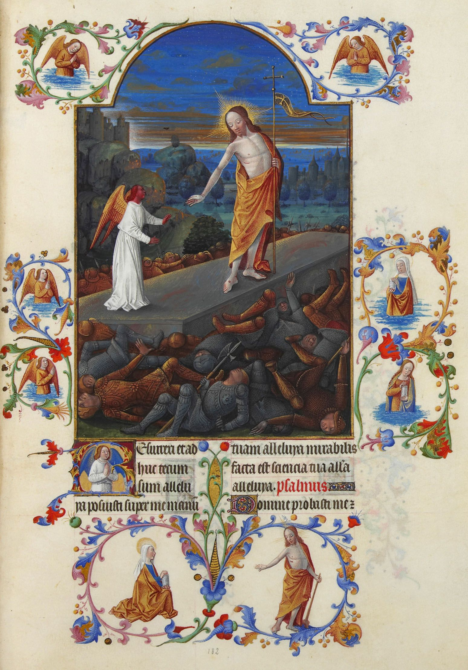 Le Christ, debout sur son tombeau accompagné d'un ange et entourés de ses gardiens atterrés, le tout dans un paysage représenté à l'aube. La miniature est entourée d'anges en prière ainsi que des deux Maries. Tout en bas se trouve une scène du Noli Me Tangere.